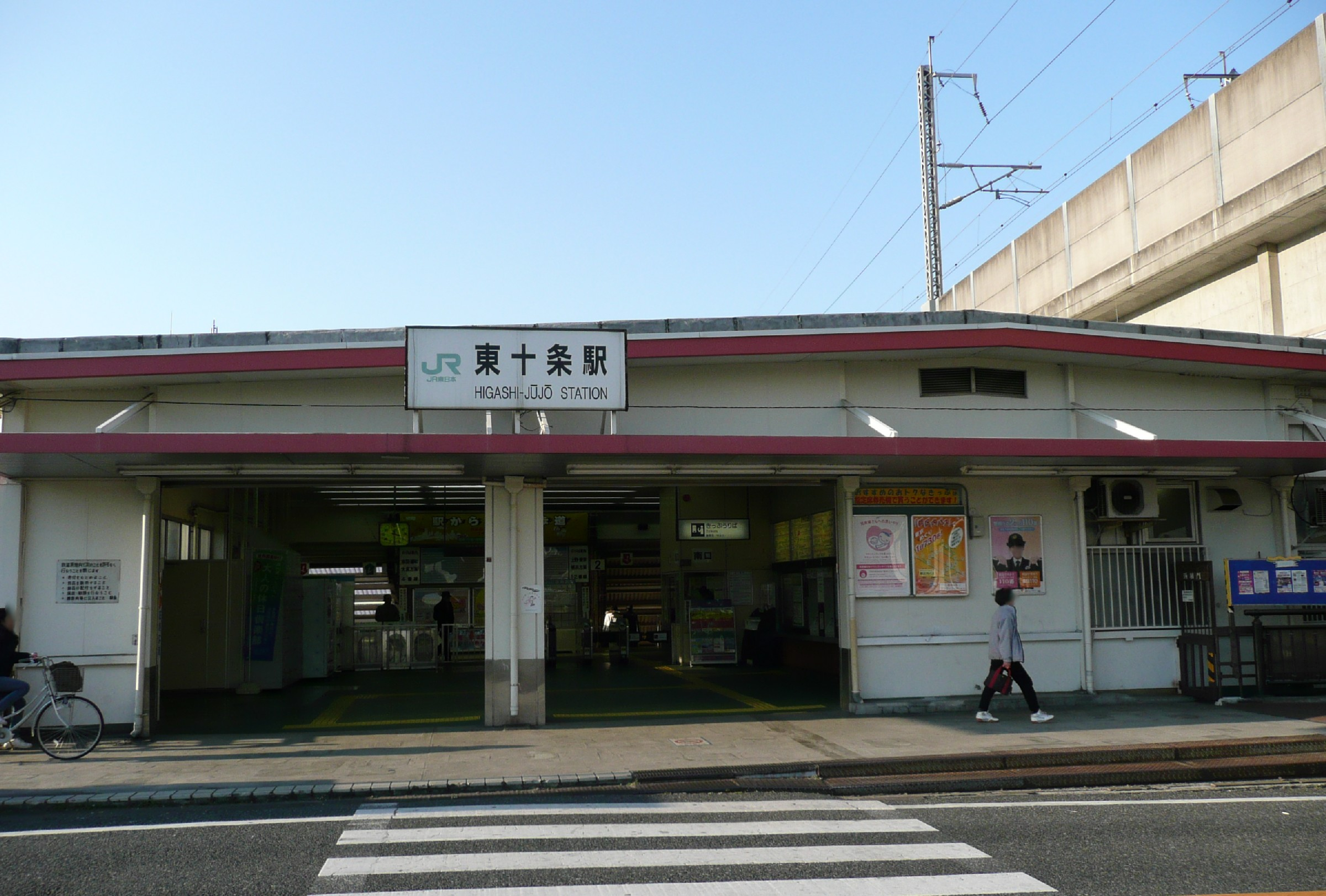 東十条駅南口